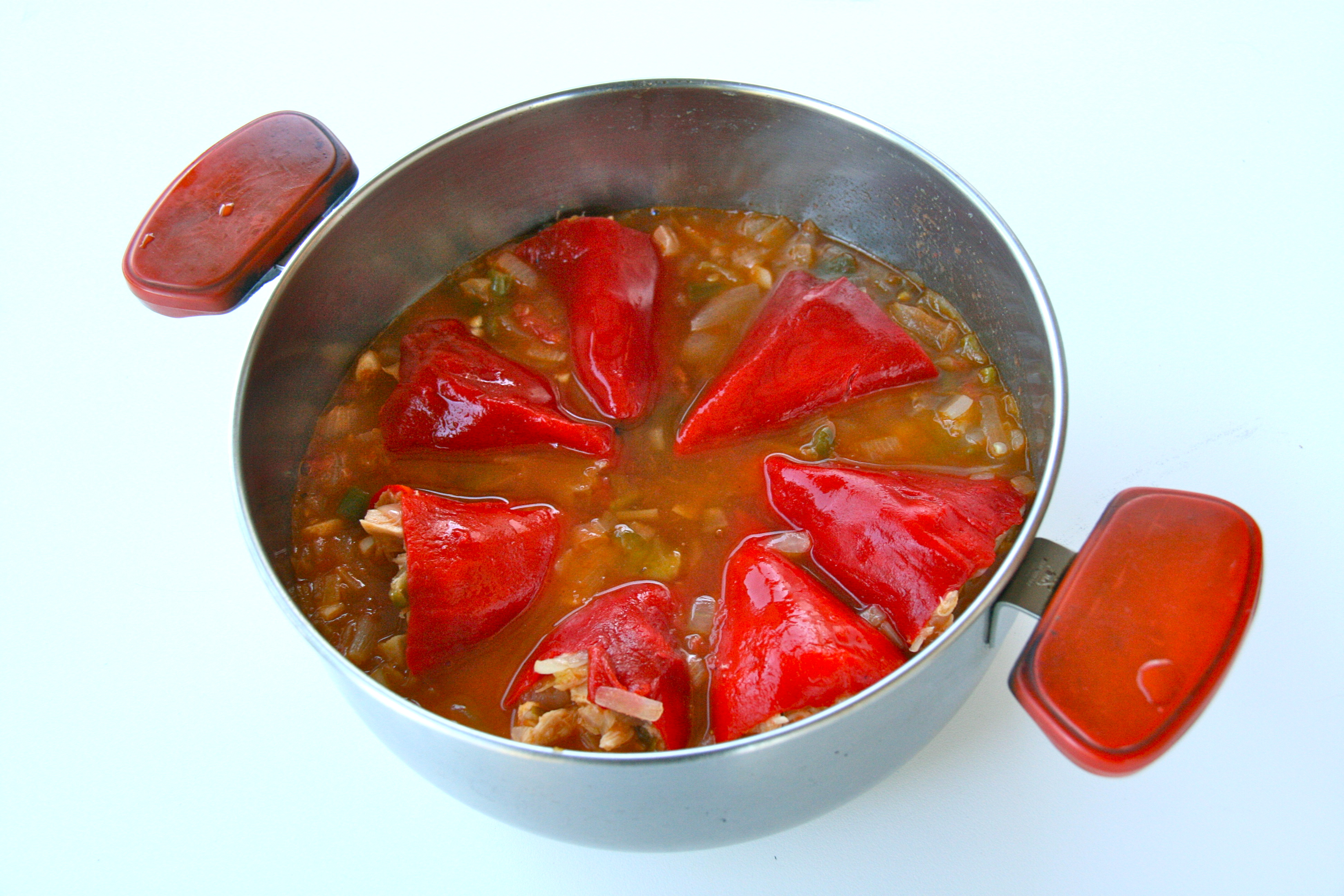 Cazuela con Pimiientos del Piquillo rellenos de bonito